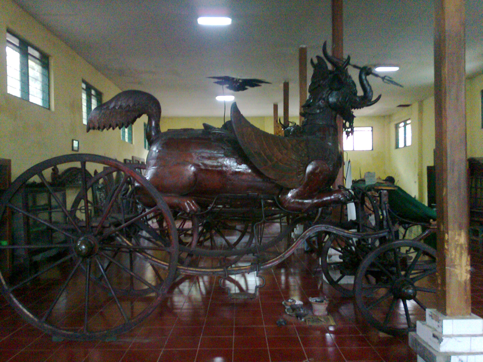 Kereta Kesultanan Kanoman Cirebon bernama Paksi Naga Liman